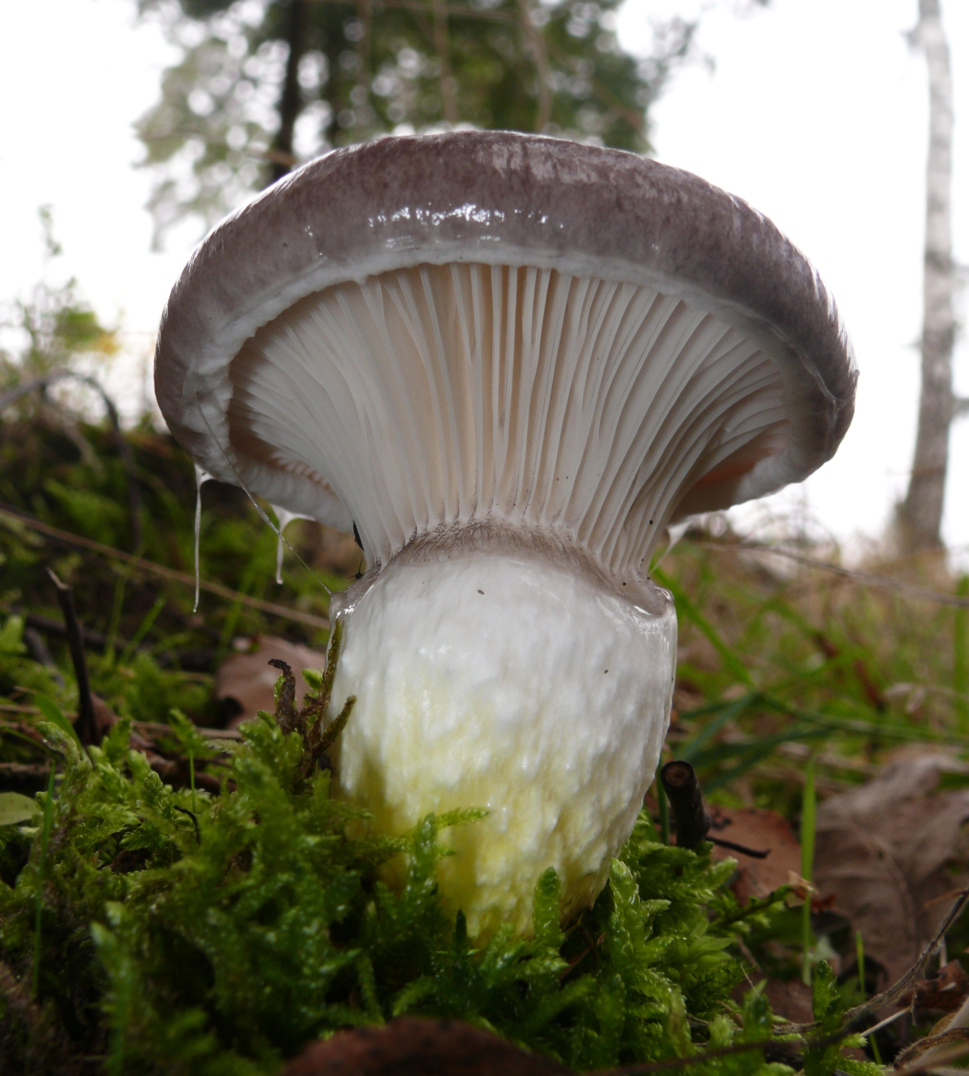 Gomphidius glutinosus, Schwäbisch-Fränkische Waldberge, Germany